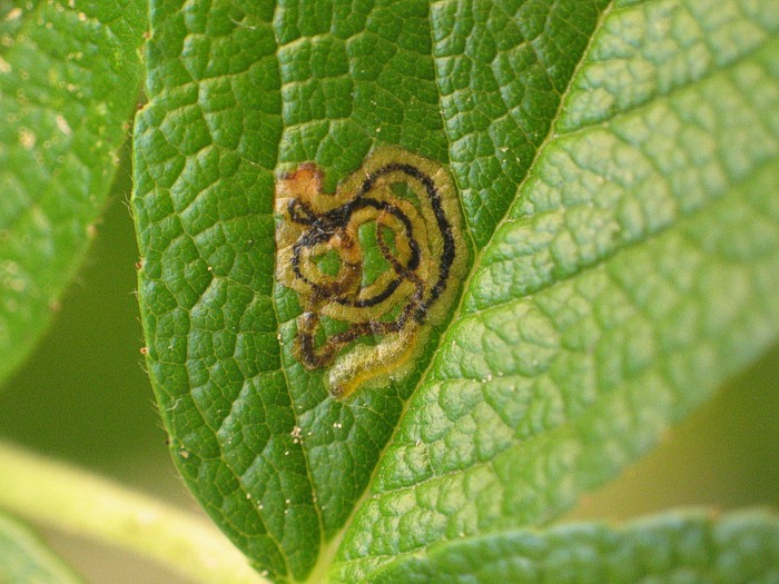 Raupe von Ectoedemia angulifasciella